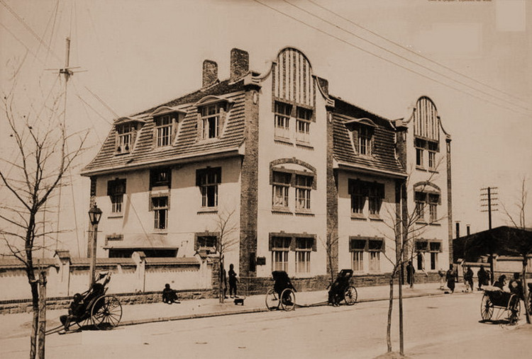 青岛馆陶路捷成洋行旧址